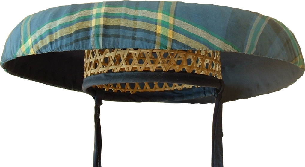 Le salako est un couvre-chef typique des îles des Saintes (Guadeloupe - France)